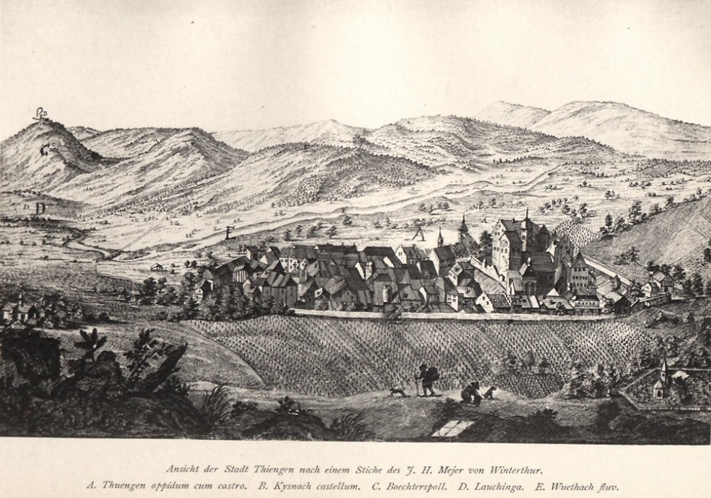 Tiengen am Hochrhein